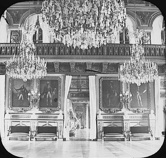 Salon des Maréchaux du Palais des Tuileries